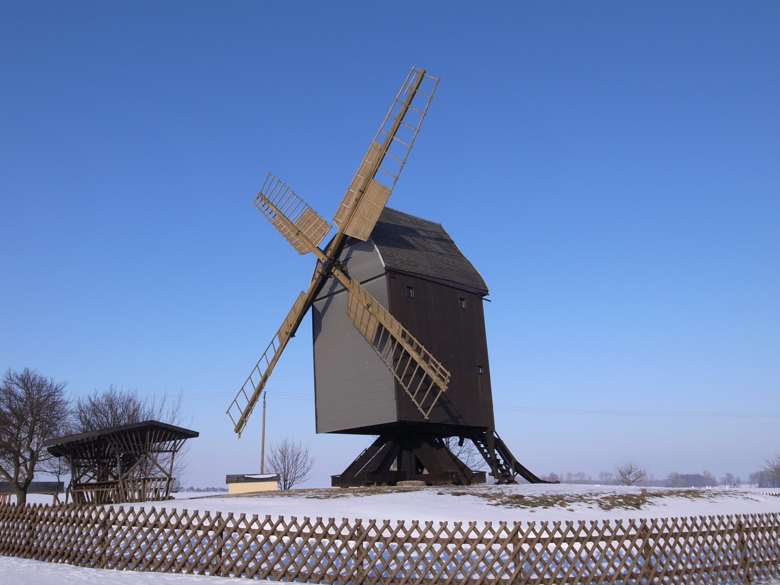 Libehna_Windmühle, Erbaut 1814, Lage: zwischen Libehna und Repau, Koordinaten 51.715155 12.064056